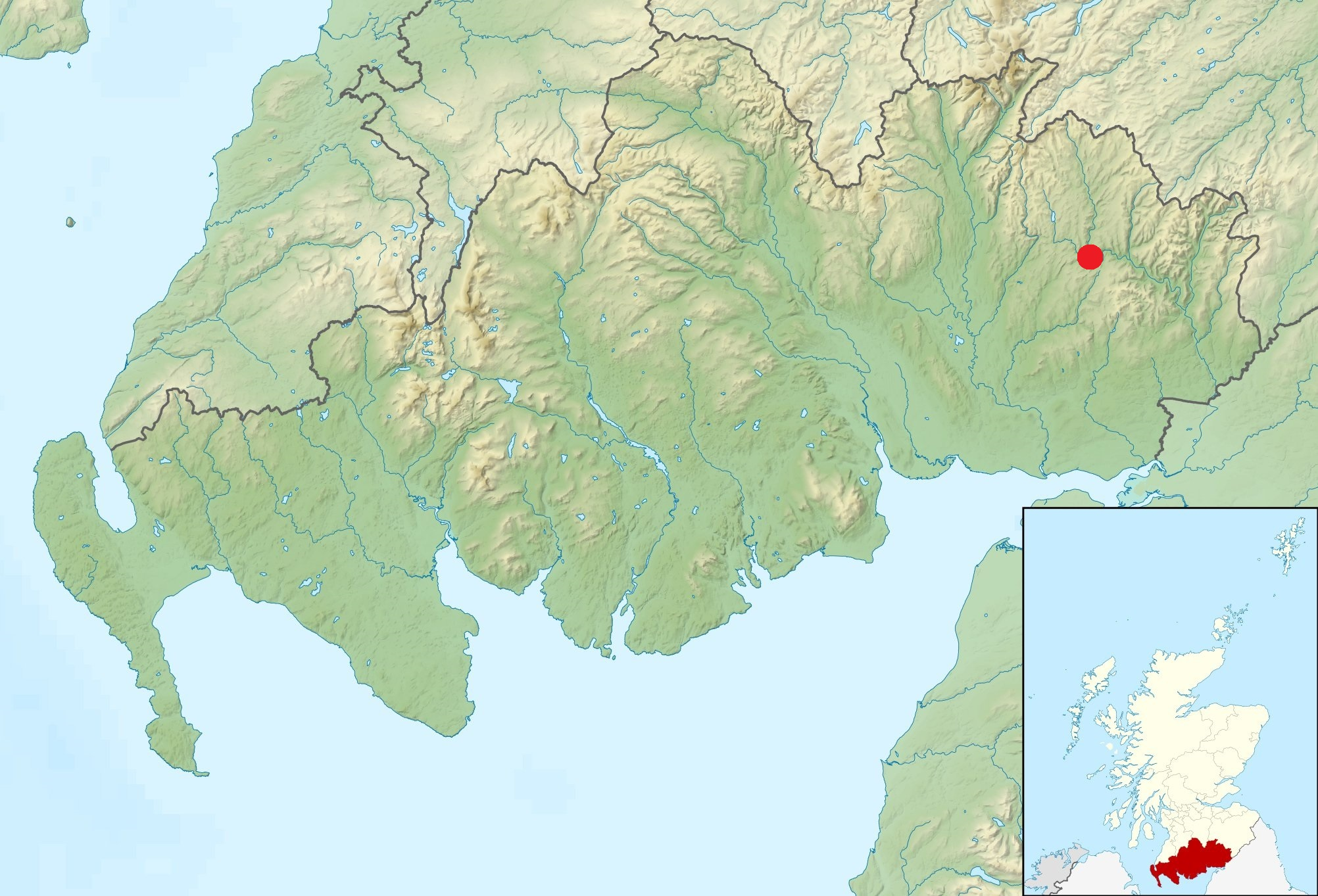 Gàidhlig: Mapa Bhentpath, faisg air Langaim.